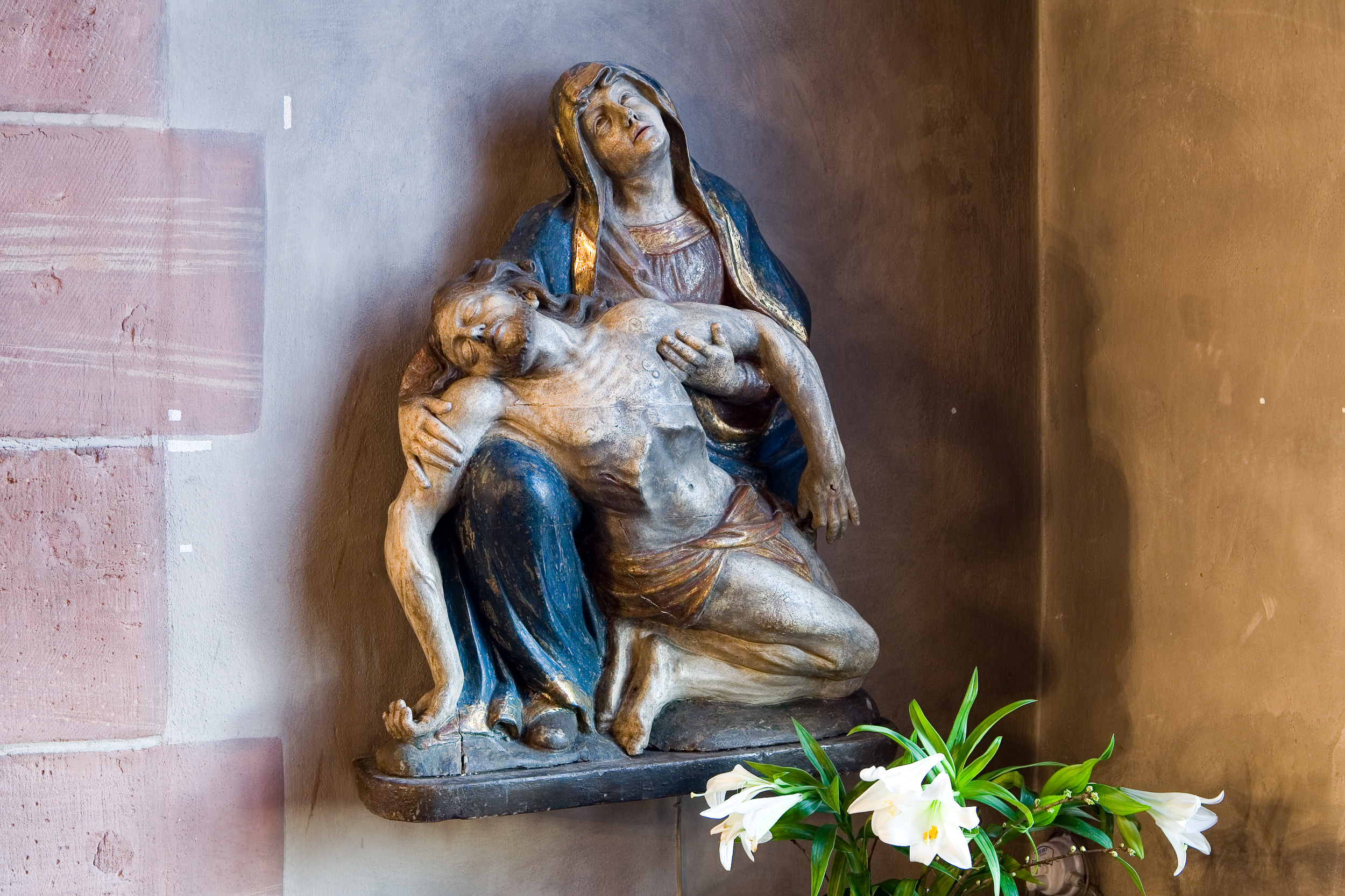 Pietà (Süddeutschland, 17. Jahrhundert) im südlichen Seitenschiff der Leonhardskirche in Frankfurt am Main. Selber fotografiert im März 2008, Doppellizensierung GFDL & CC-BY-SA 2.5.